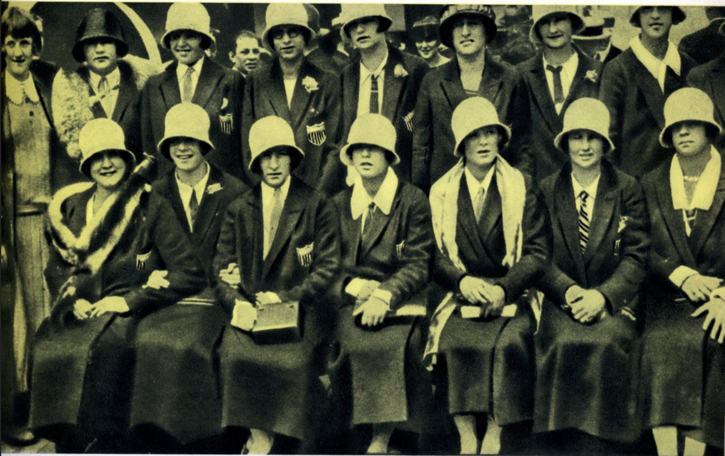 La squadre delle nuotatrici statunitensi che ha partecipato ai Giochi olimpici di Parigi 1924.